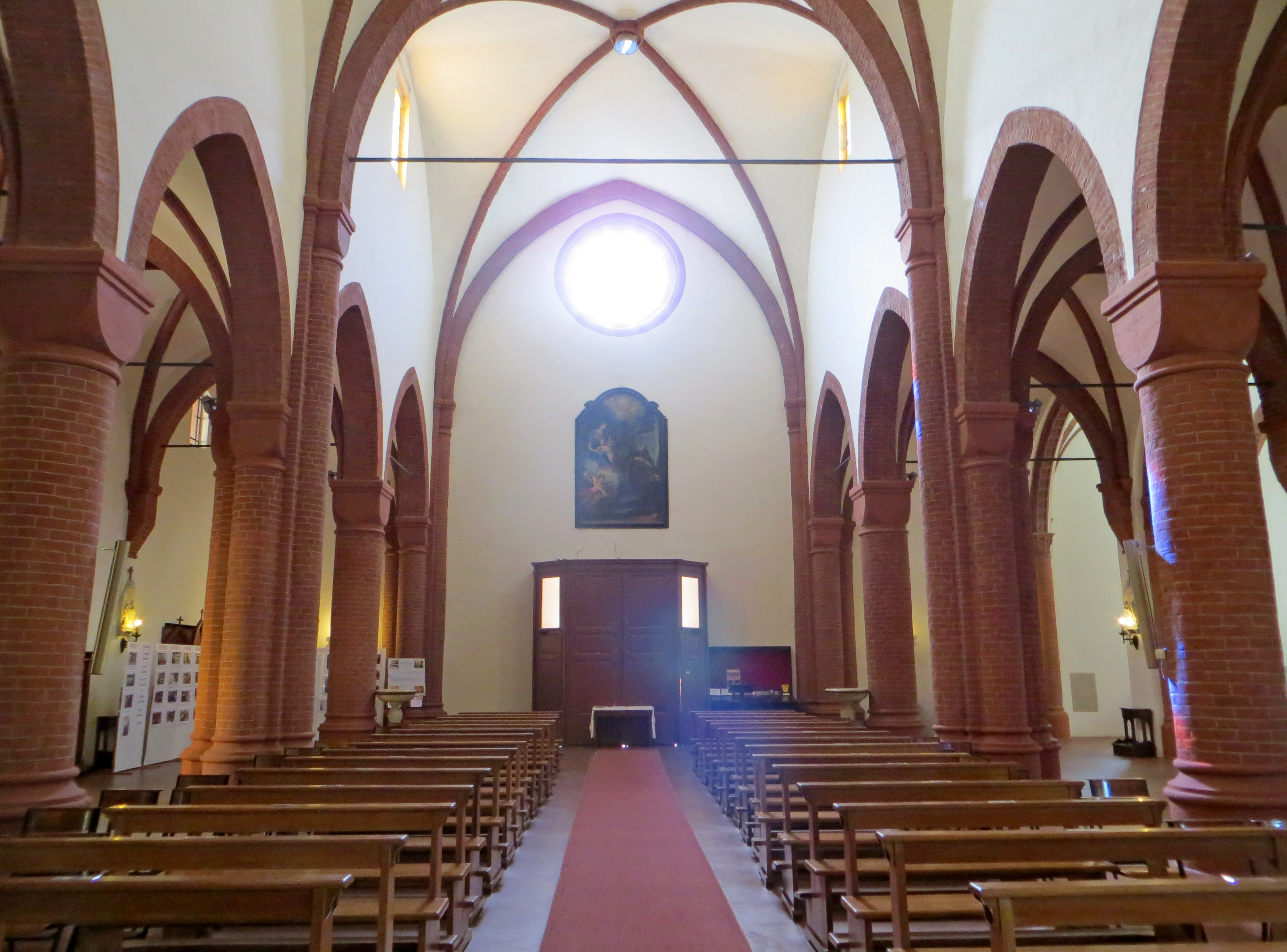 Chiesa di Santa Maria degli Angeli (Busseto) - navata centrale e controfacciata